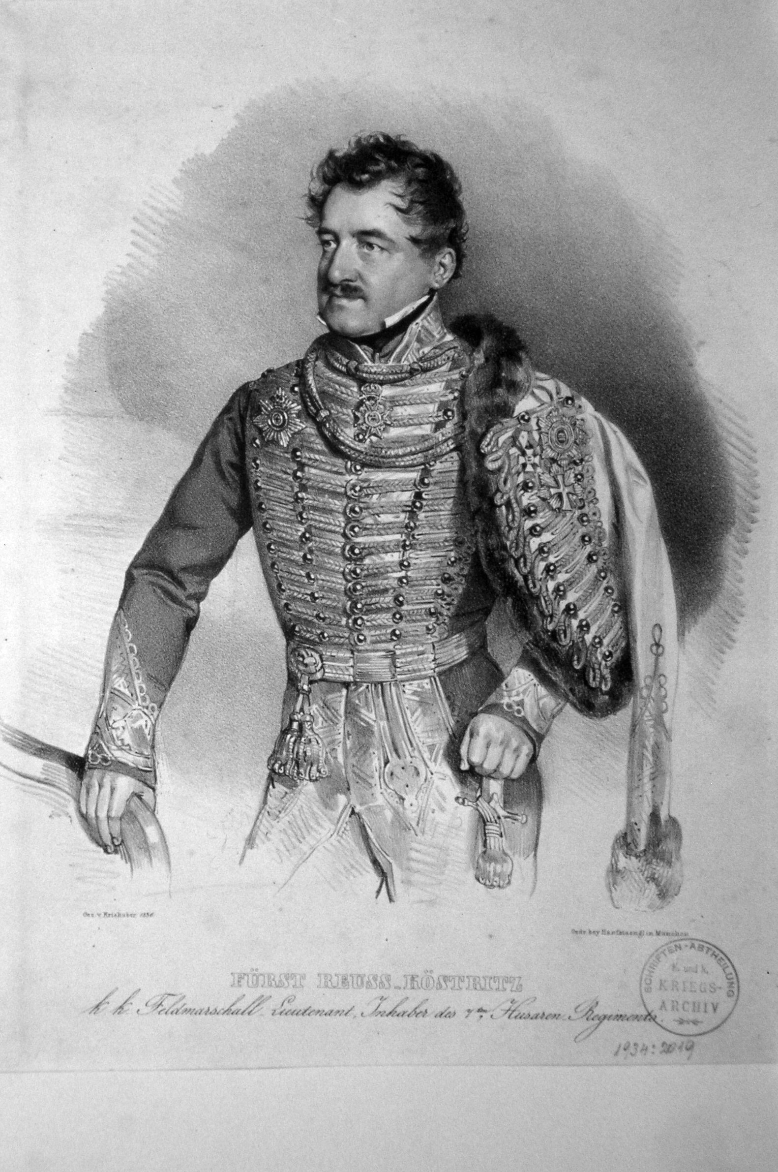 Heinrich LXIV (Reuss-Köstnitz) 1787-1856, Prince, Austrian Generallabel QS:Len,"Heinrich LXIV (Reuss-Köstnitz) 1787-1856, Prince, Austrian General" label QS:Lde,"Heinrich LXIV Fürst von Reuss-Köstnitz (1787-1856), Österreichischer General"